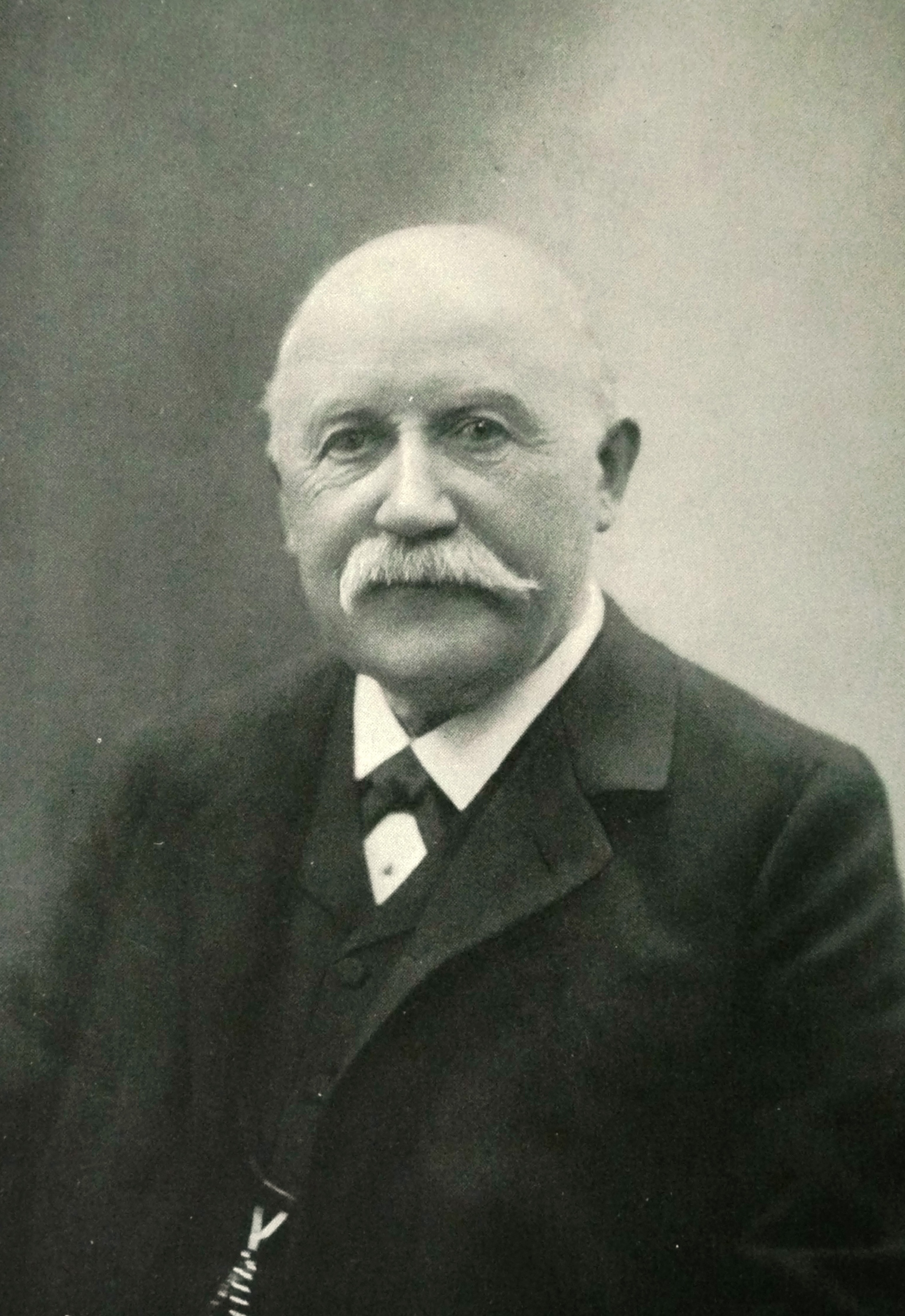 Lous Lekebusch Fabrikant in Wuppertal Geb.: 23.05.1835 in Elberfeld Gest.: 06.02.1909 in Barmen